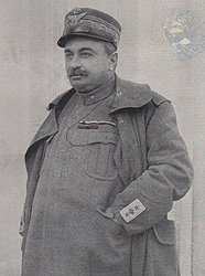 Generale Luigi Capello